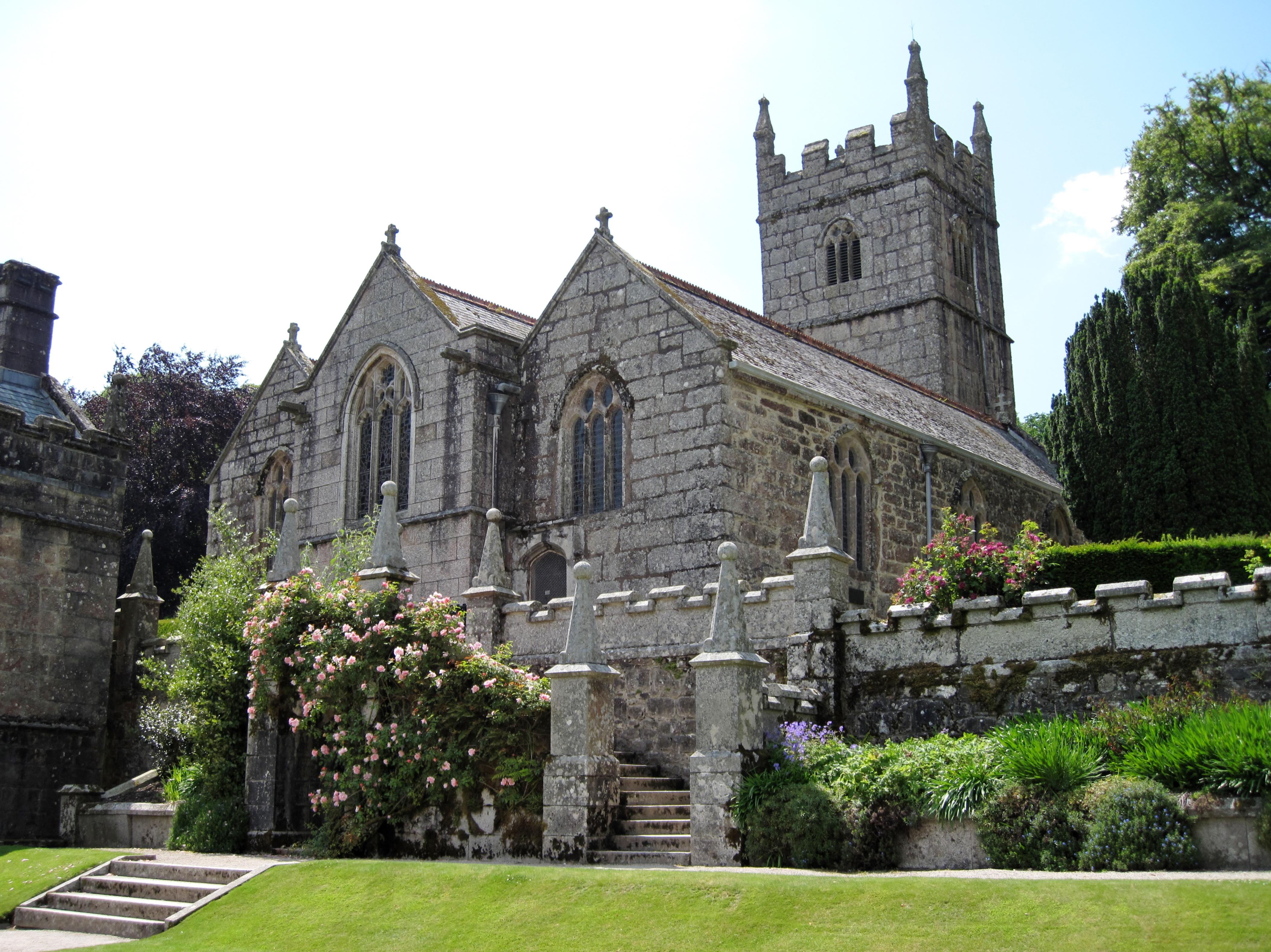 Kirche von Lanhydrock, einem Herrenhaus nahe Bodmin in Cornwall, England